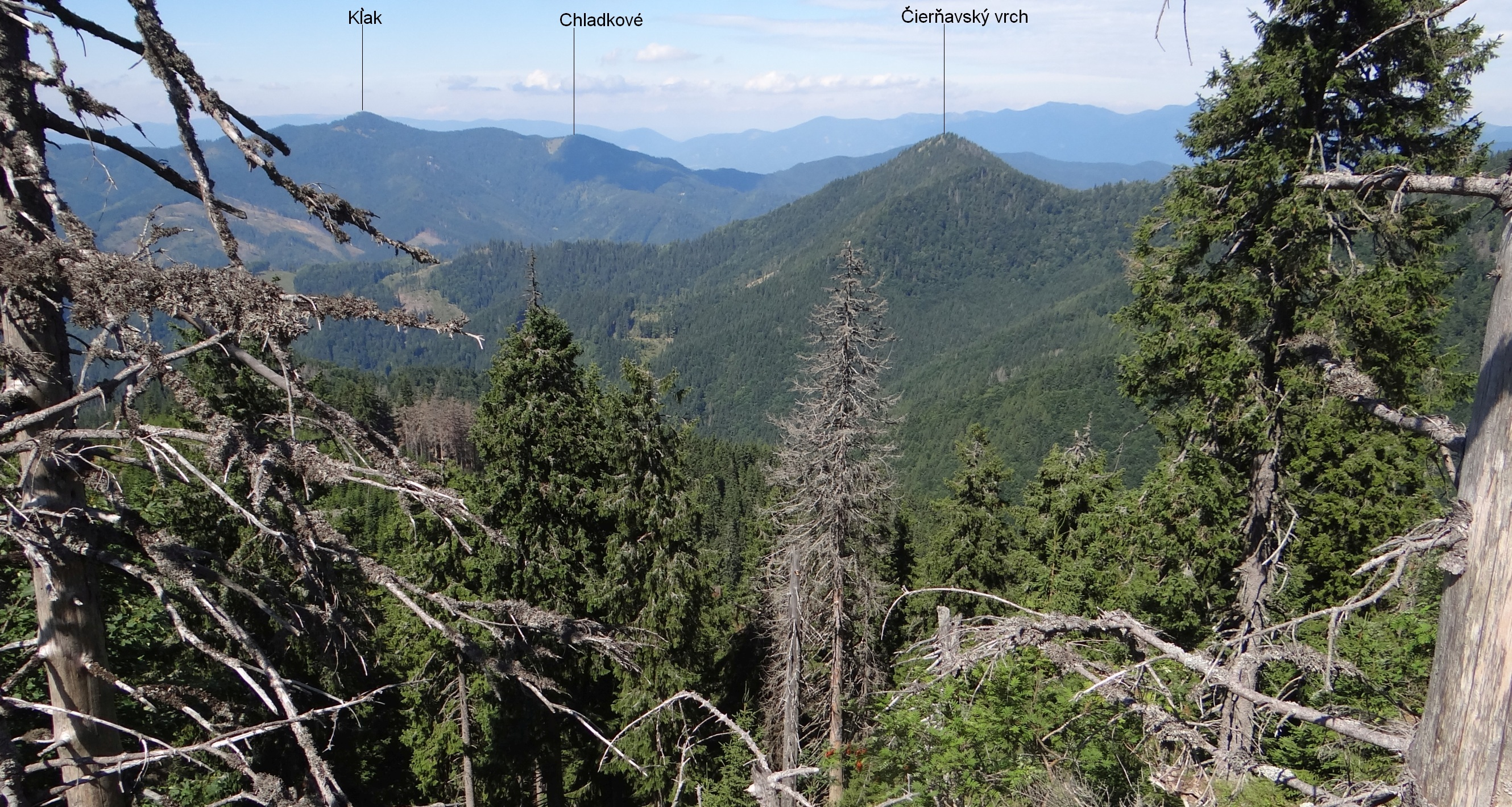 View from Nižné Šiprúnske sedlo